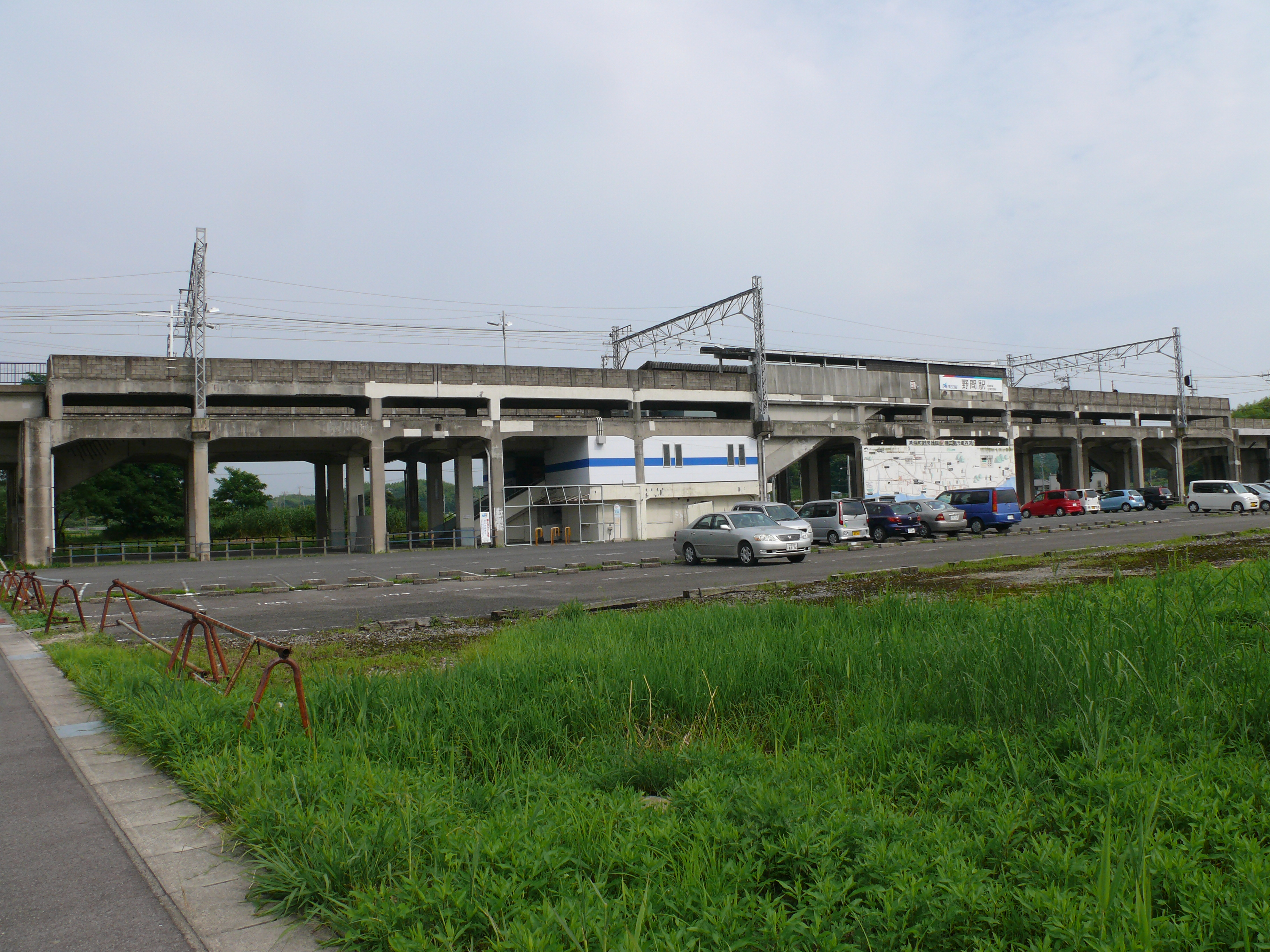 愛知県知多郡美浜町にある名古屋鉄道の野間駅